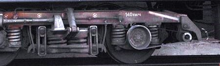 Ремённый привод поездного электрогенератора